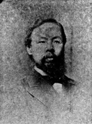 小室信夫（1839-1898）